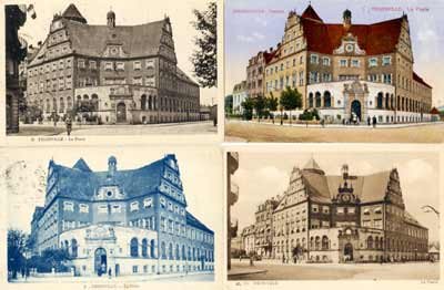 Postes de Thionville